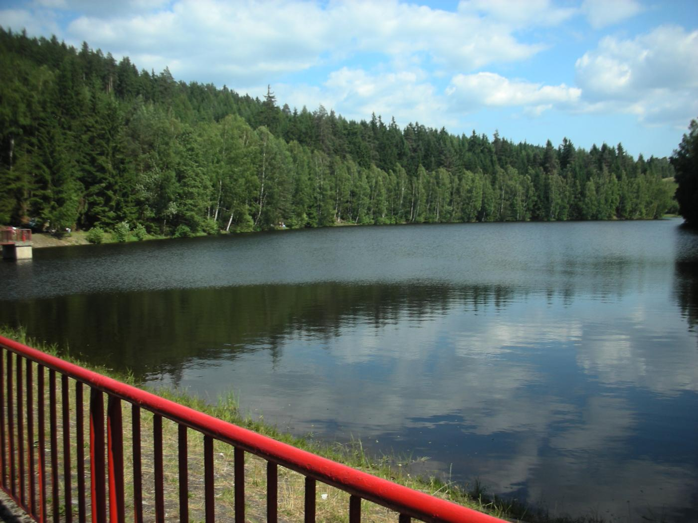 Stausee Bílý Halštrov bei Dolní Paseky, gestaut wird der Oberlauf der Weißen Elster